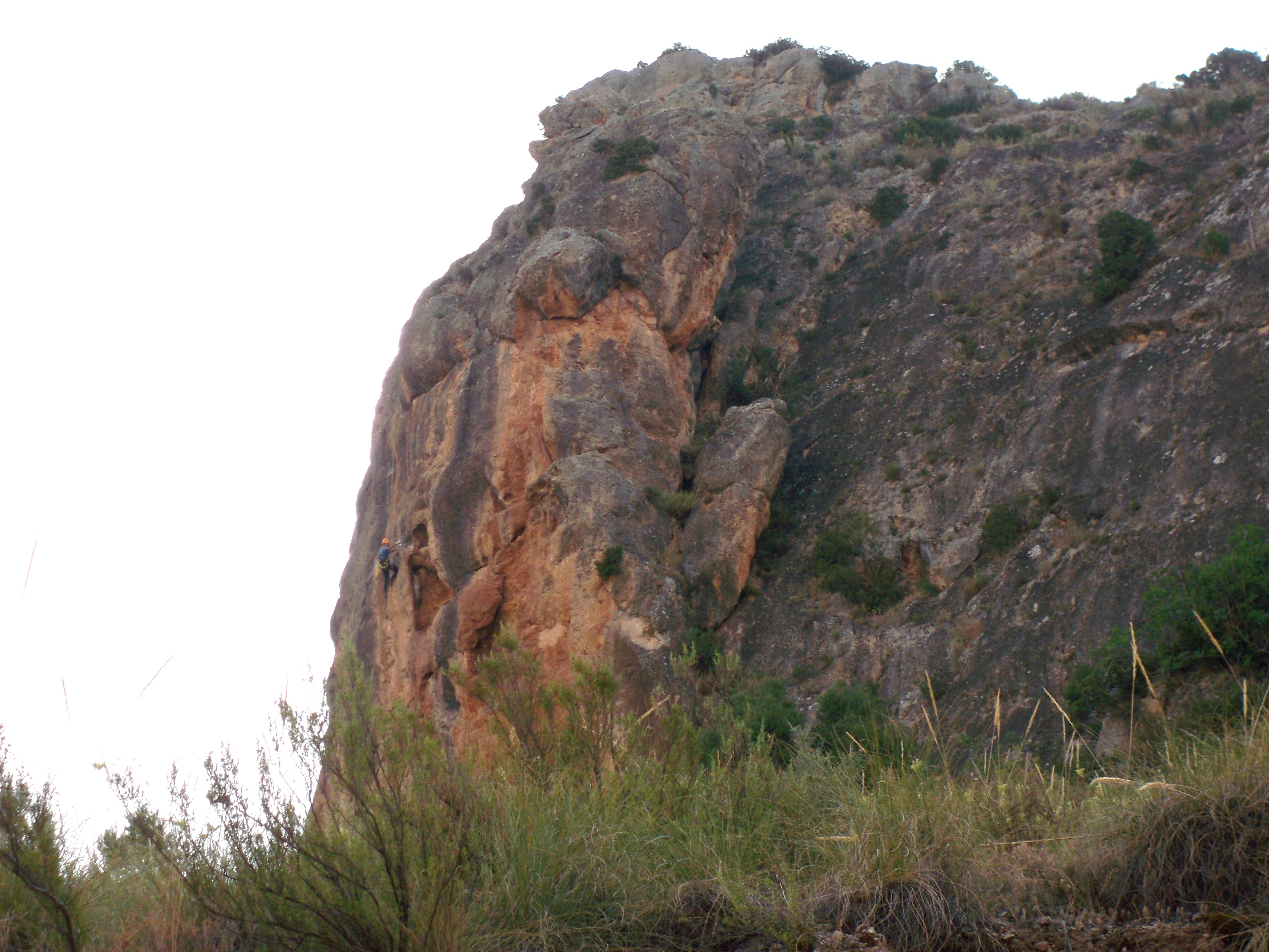 Escalador en una de las paredes laterales de la Peña Perico (Molinicos)